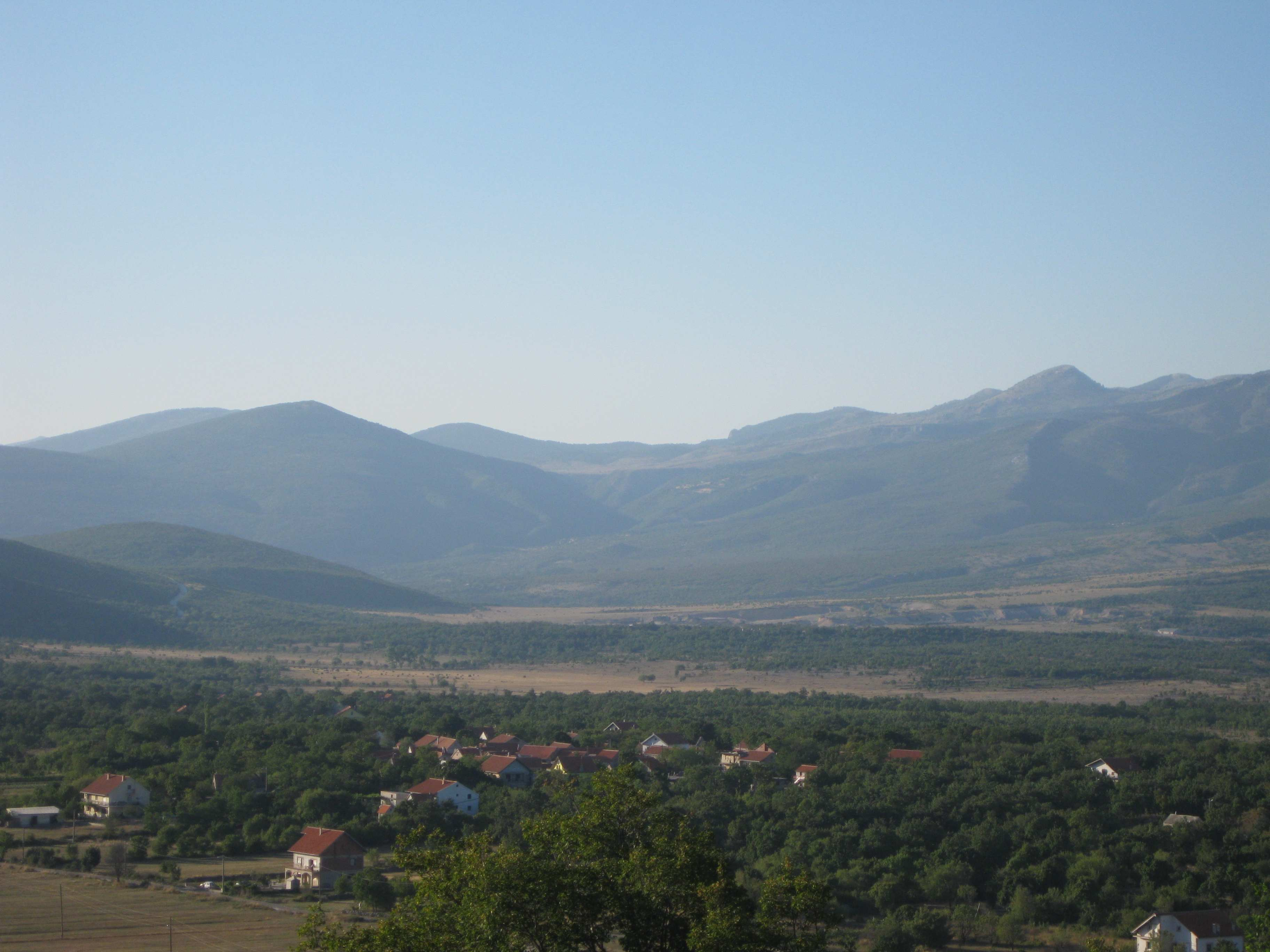 Krajolik kod Kijeva